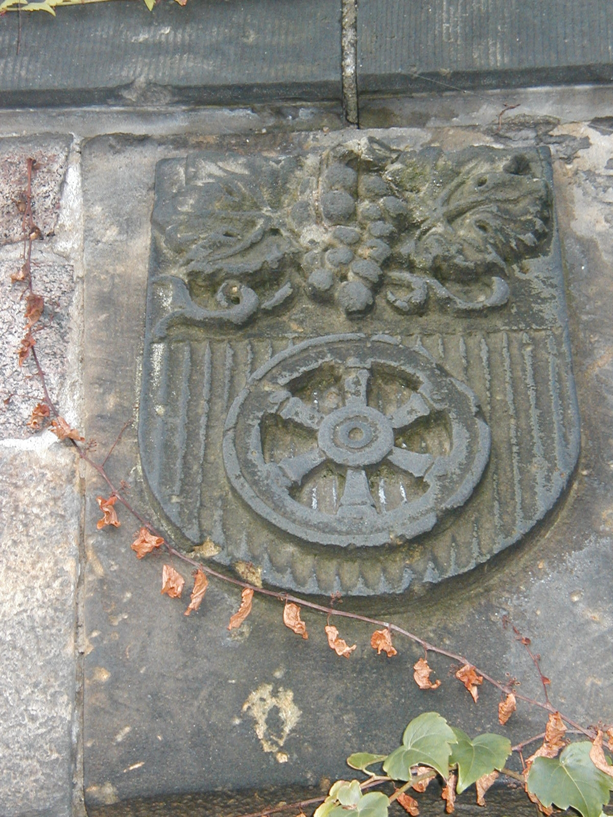 Radebeuler Wappen am Eingang von Hofloesnitz